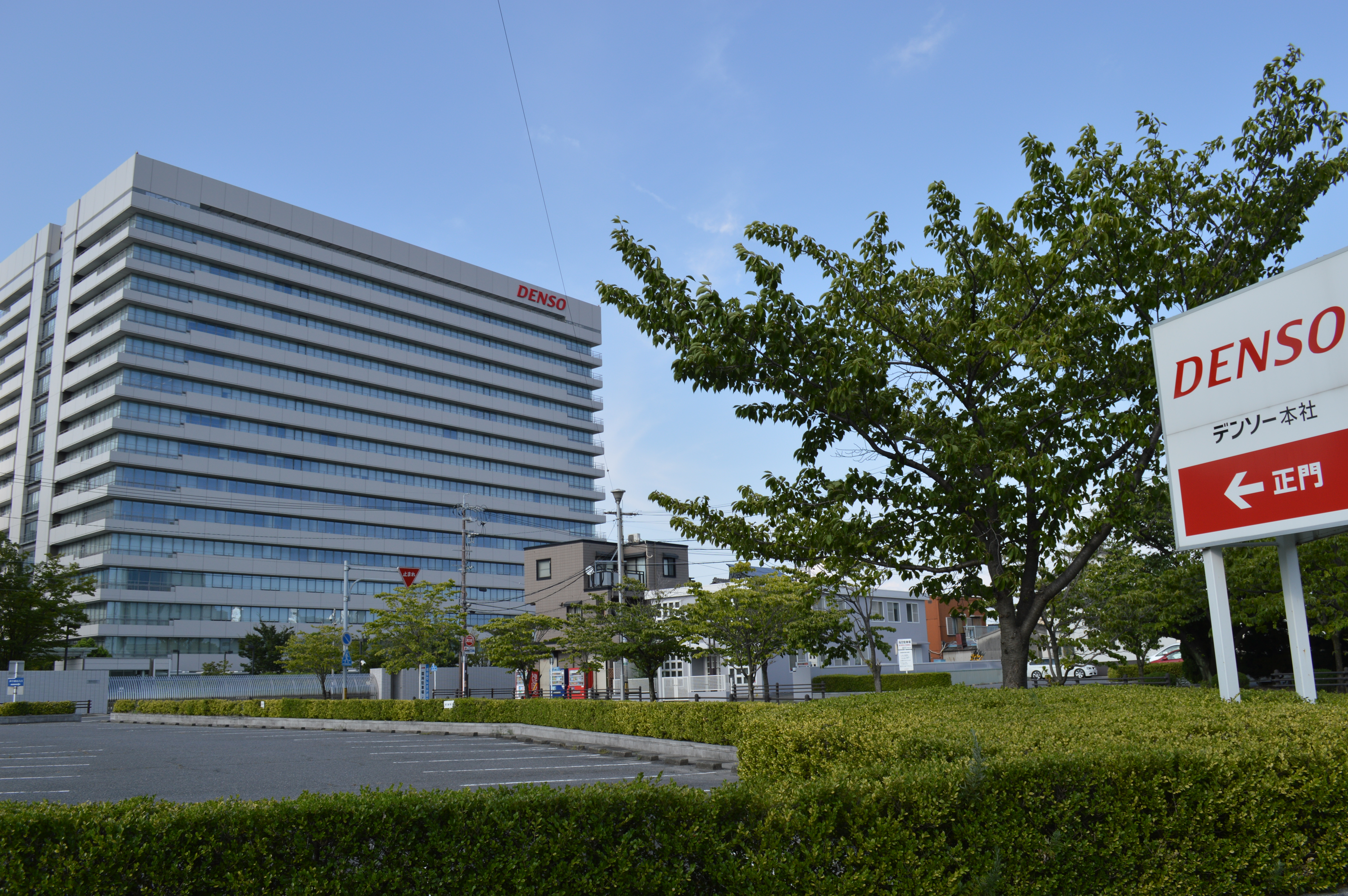 愛知県刈谷市にあるデンソー本社ビル